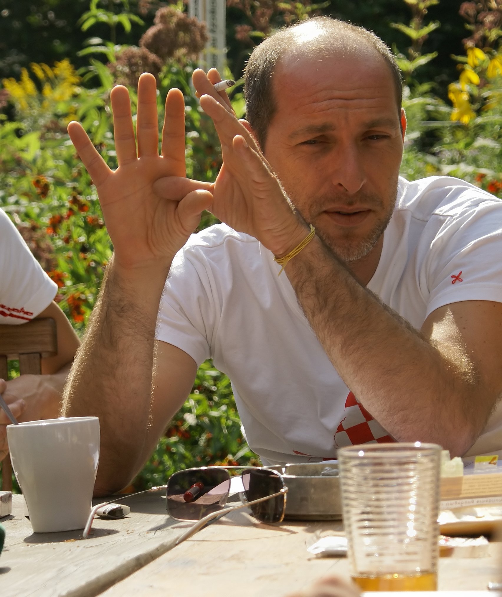 German Director Ralf Schmerberg in Berlin, September 2007